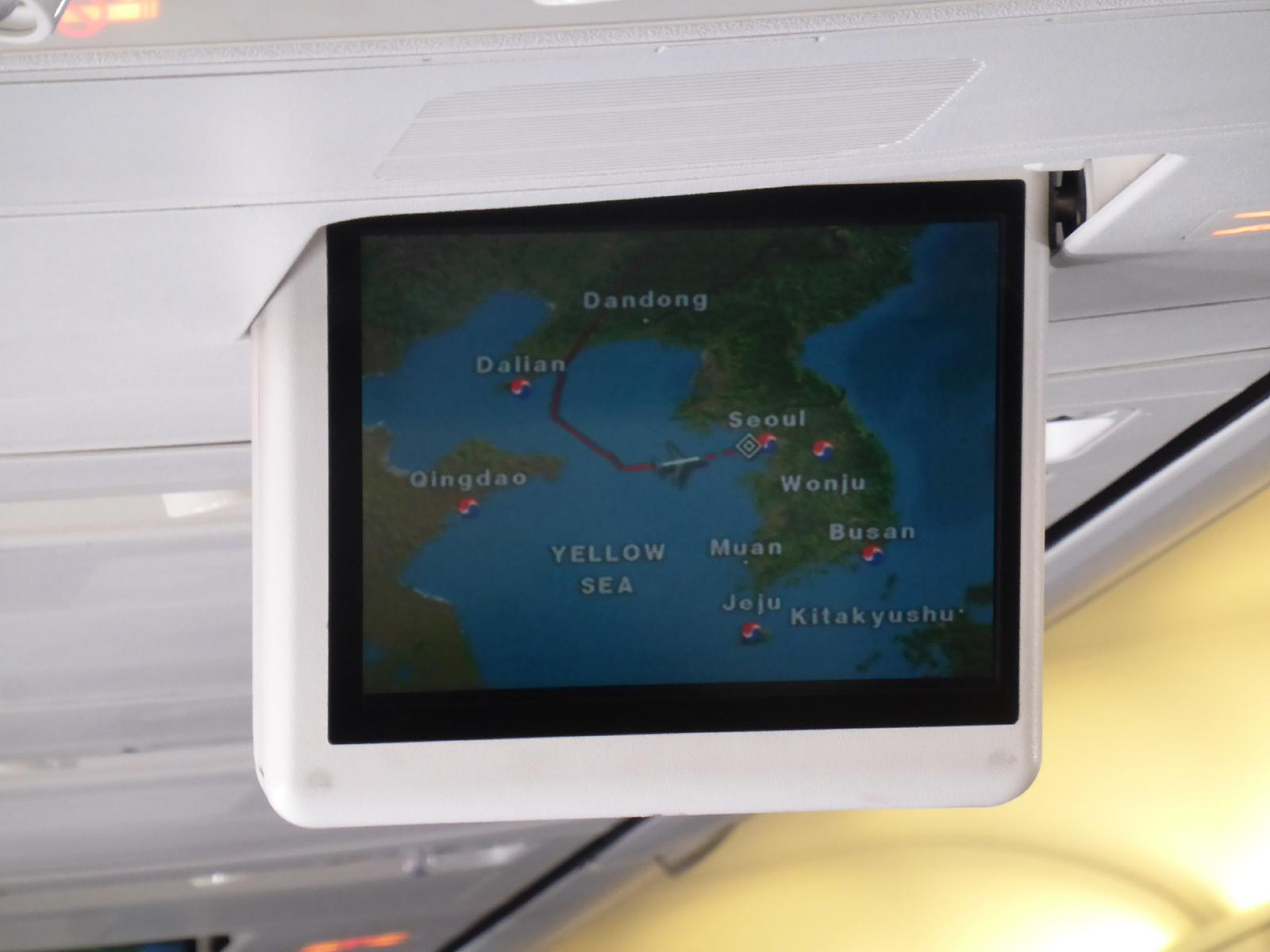 延吉空港の国際路線で最も多い仁川空路は青島近くで方向転換する